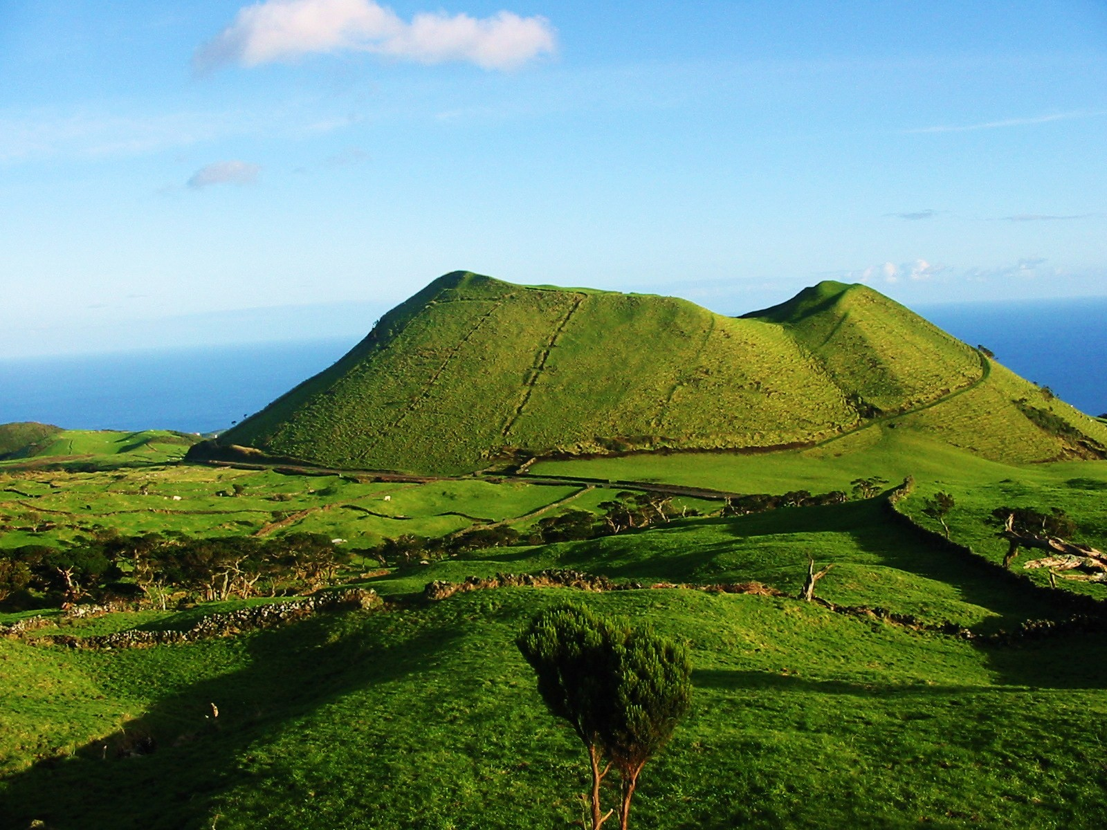 Cone no Pico